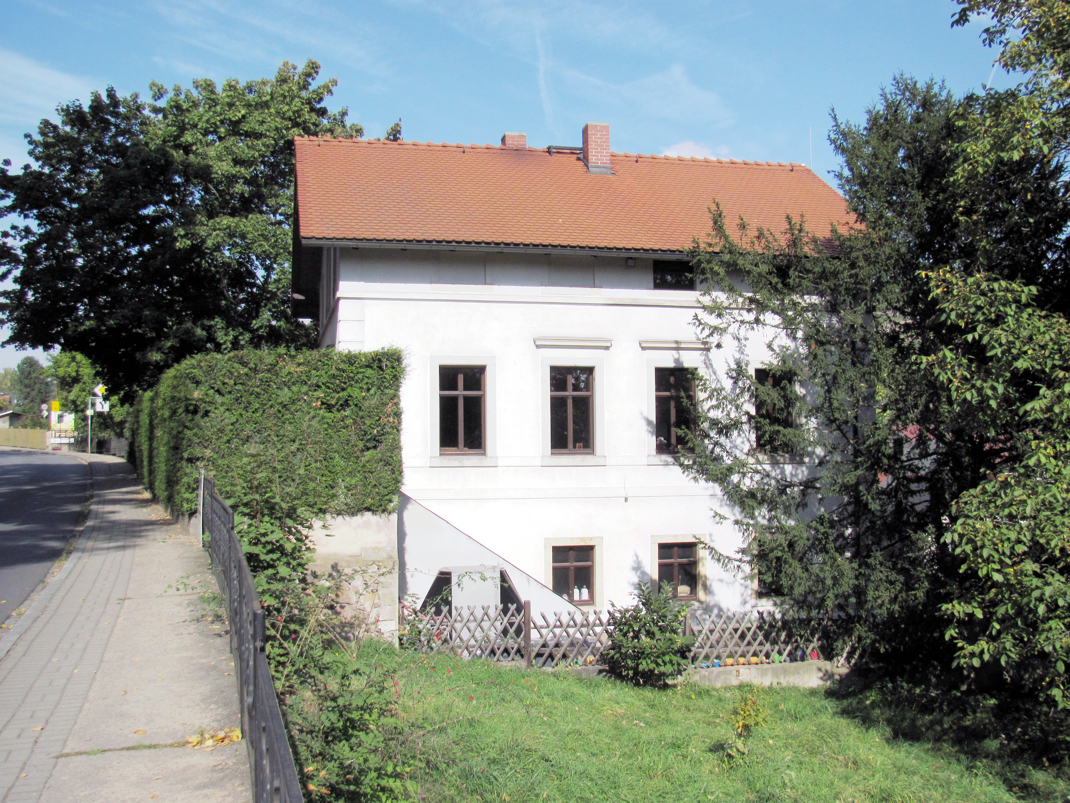 Radebeul, Villa August Ramm, von Süden